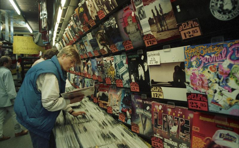 Juni 1988 Bonn - Innenstadt, Schallplattengeschäft in der Sternstraße